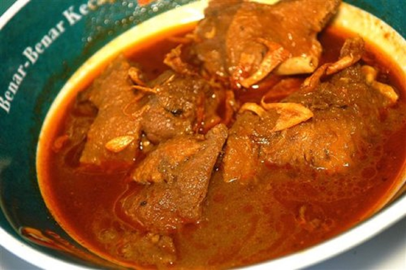 pedesan entog